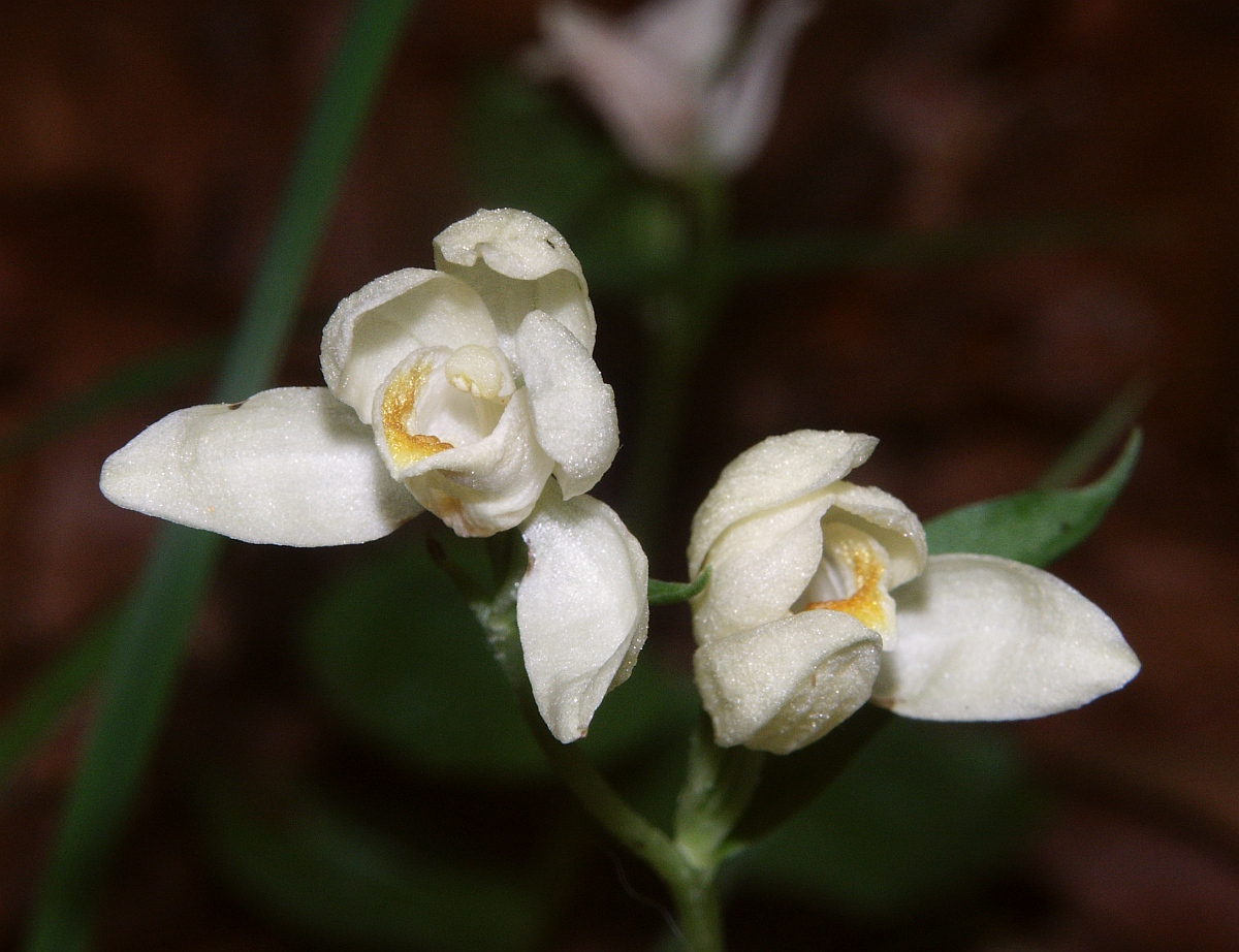 Cephalanthera damasonium, Schwäbisch-Fränkische Waldberge, Germany